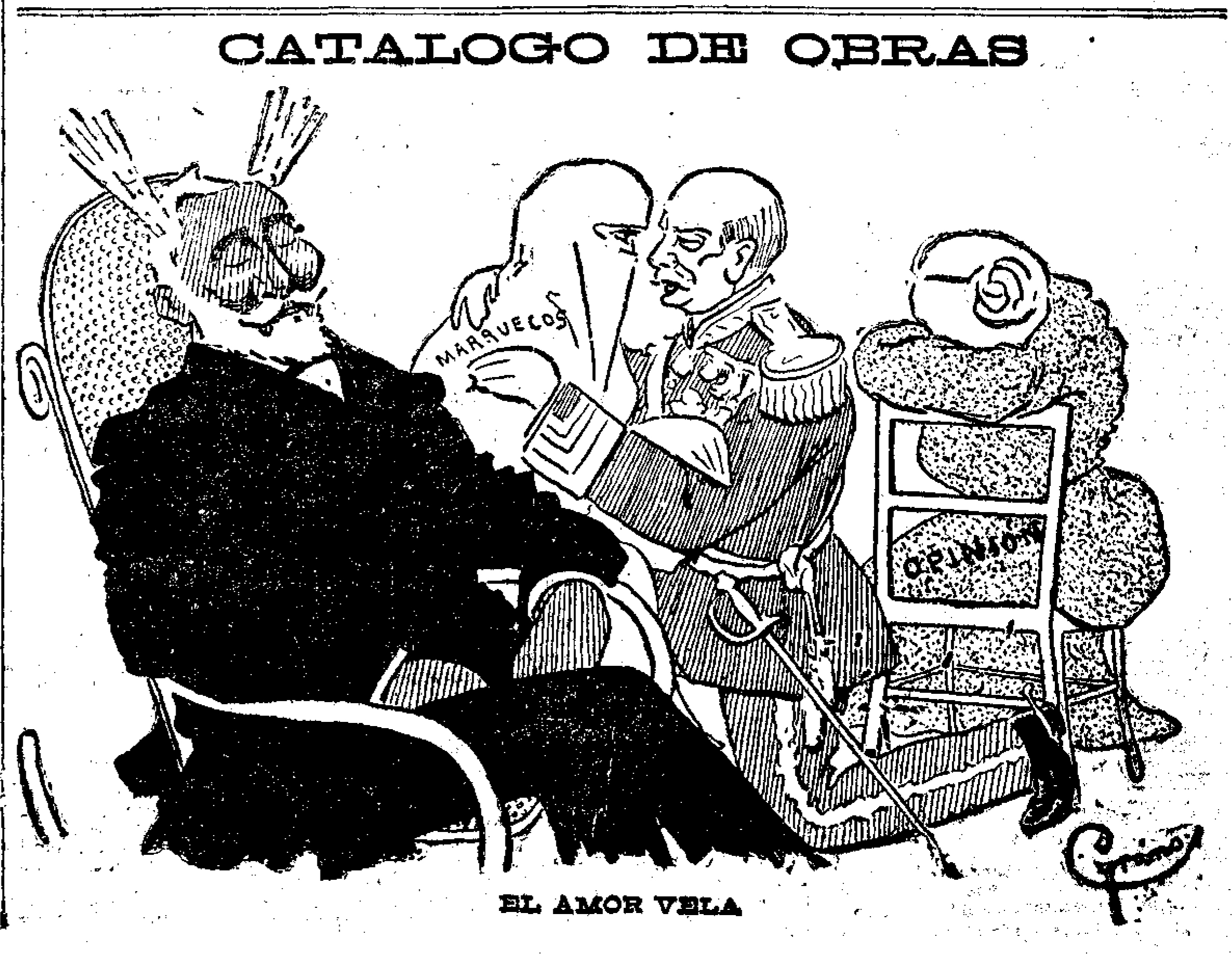 Catálogo de obras. El amor vela